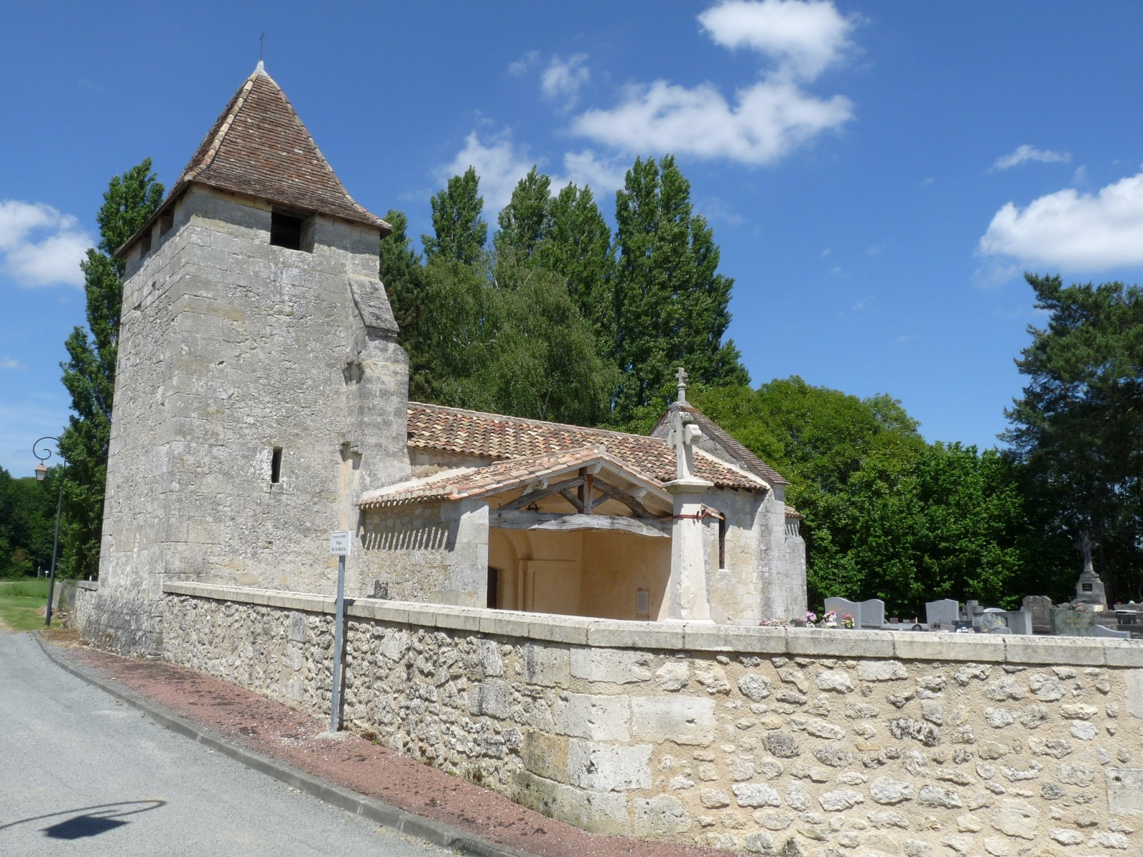 Eglise de Tarnès, Gironde, France